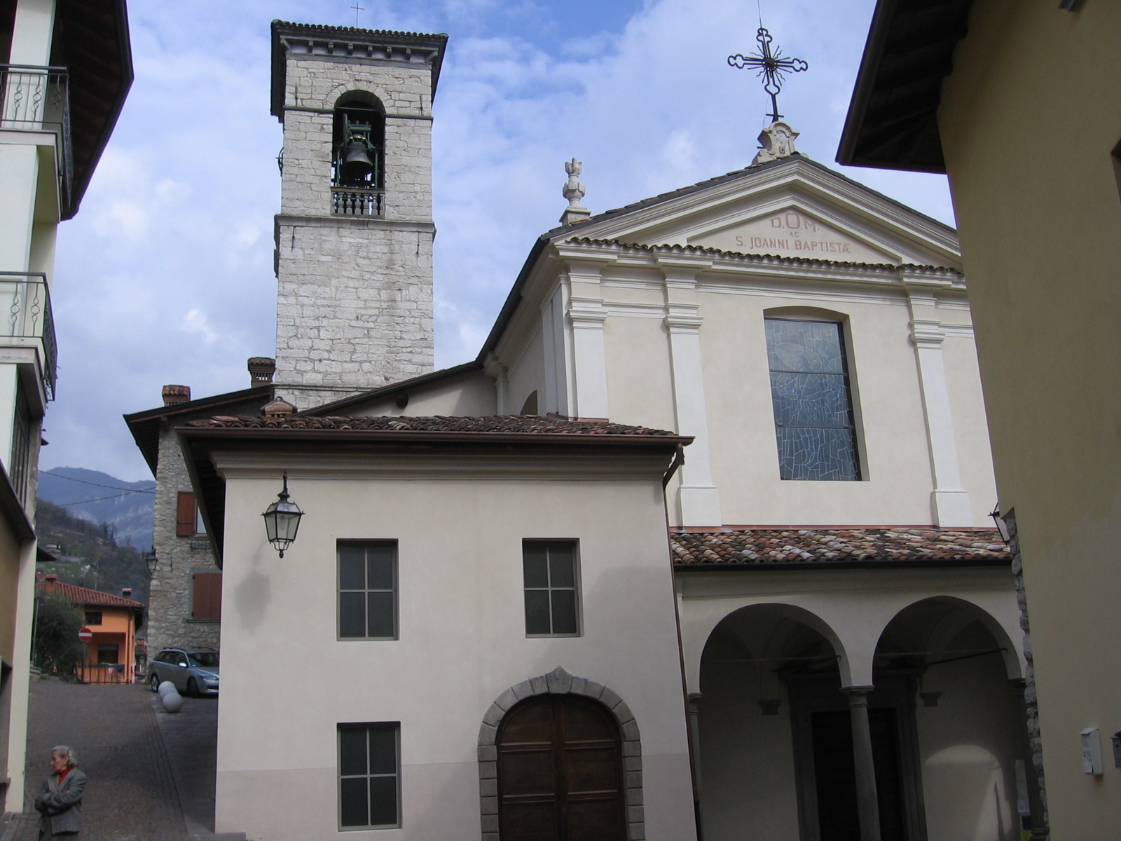 Vigano San Martino, Bergamo, Italia